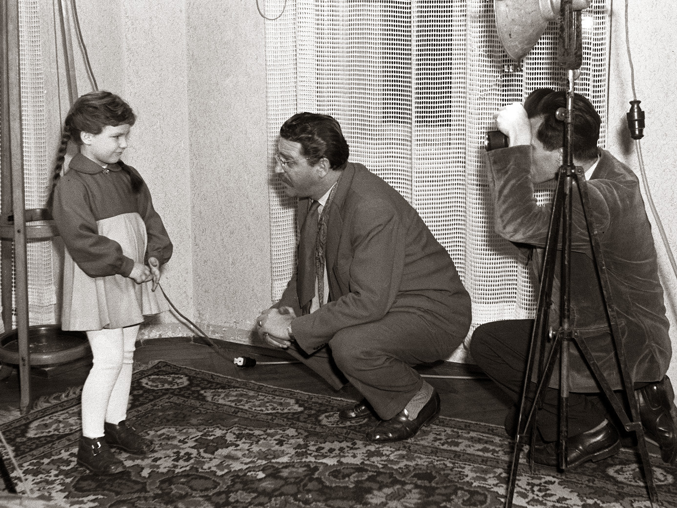 Režiser France Štiglic s svojim asistentom Maksom Sajkom izbira igralce za film Dolina miru.